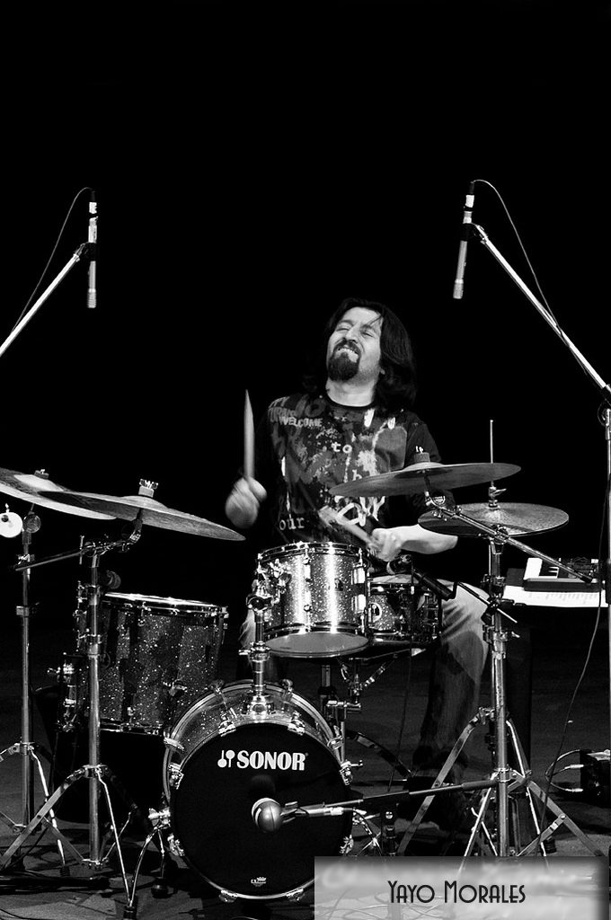 Yayo Morales en su nueva bateria sonor